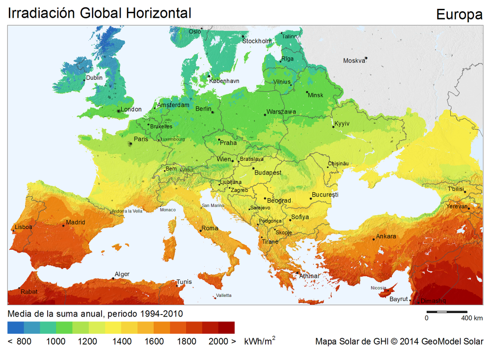 Mapa de la radiación solar en Europa: Irradiación Global Horizontal (GHI) en Europa